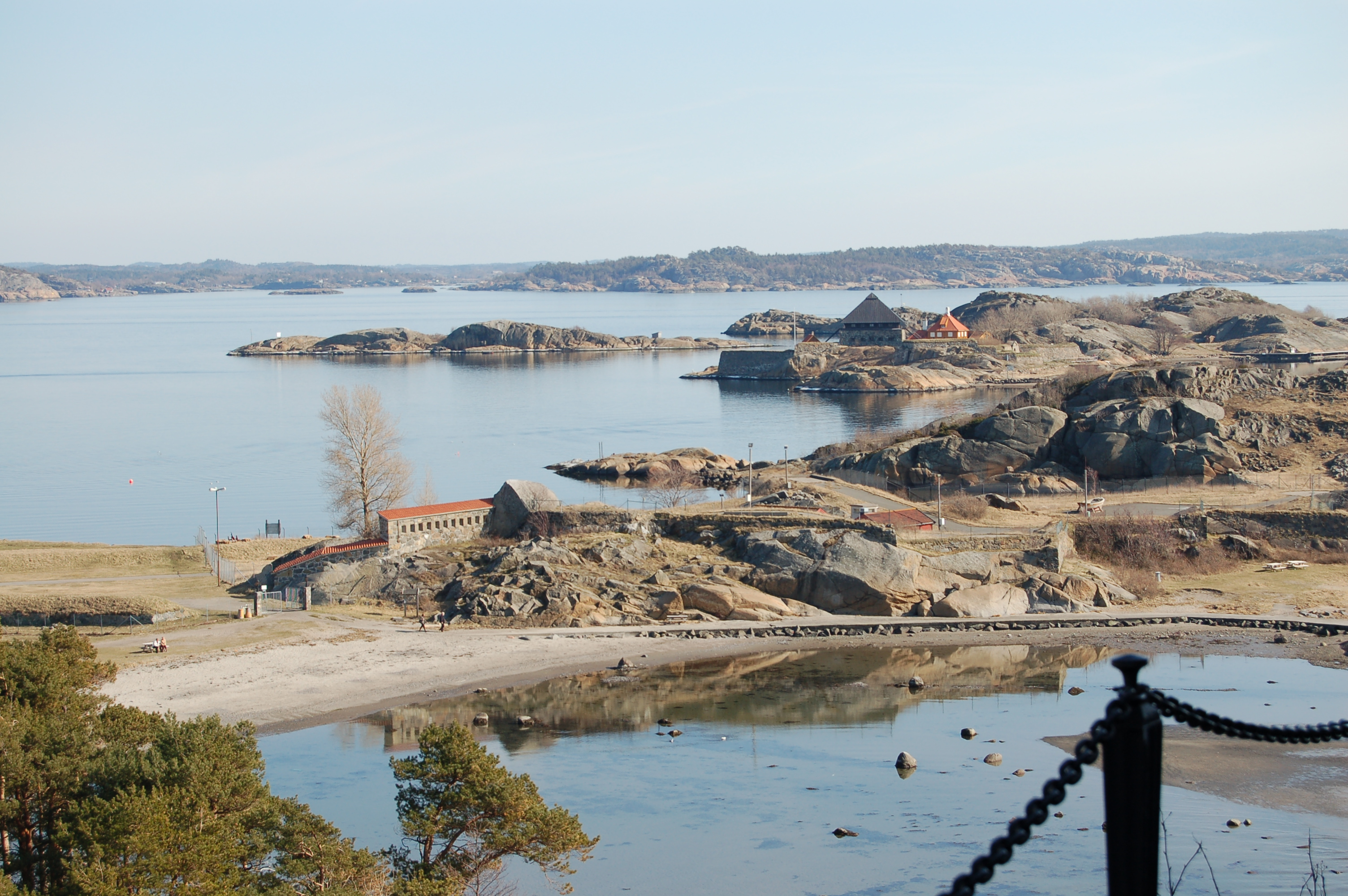 Utsikt fra Minnehallen i Larvik - mot Korntin og Citadelløya.